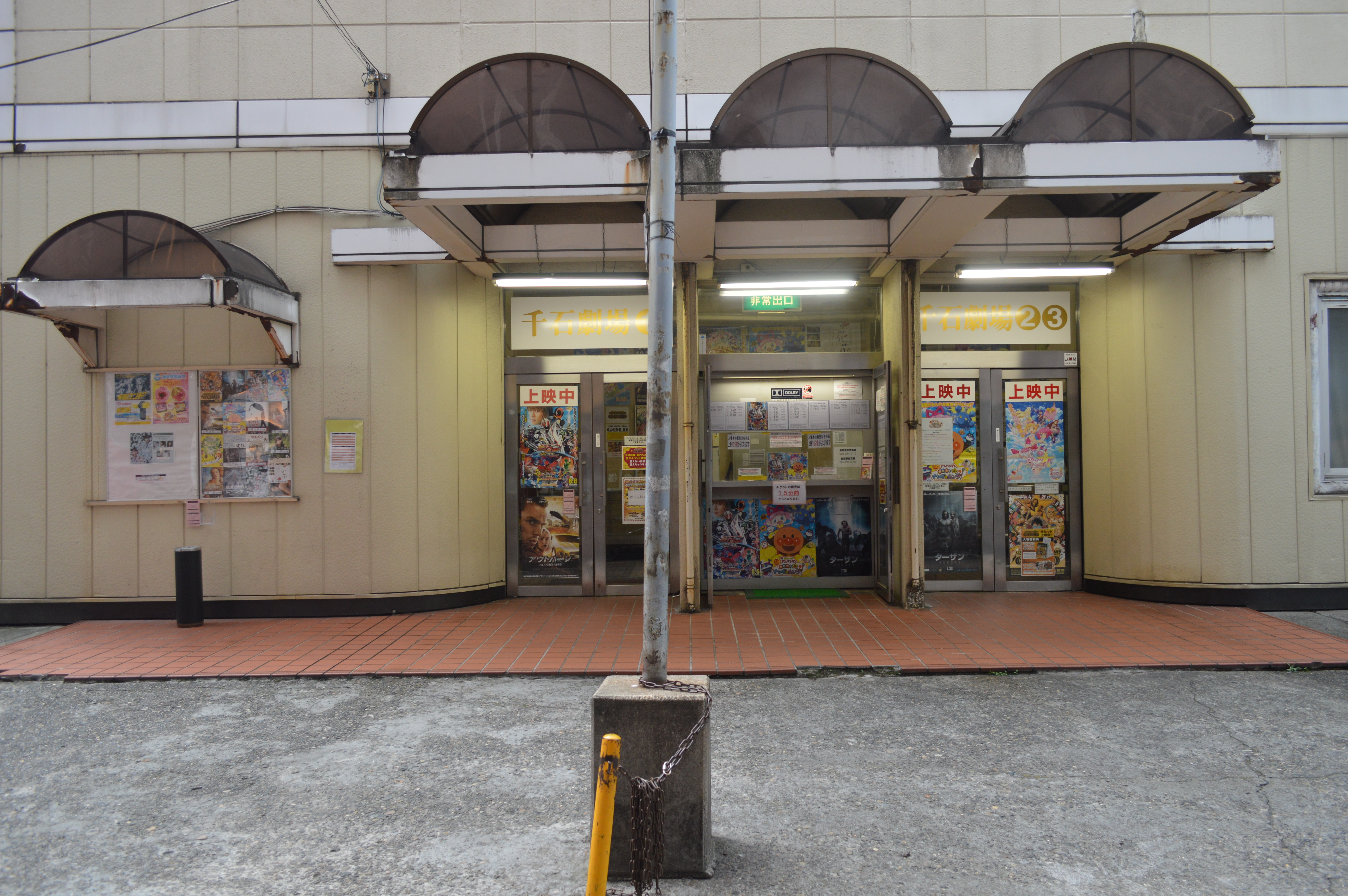 長野市の映画館、長野千石劇場